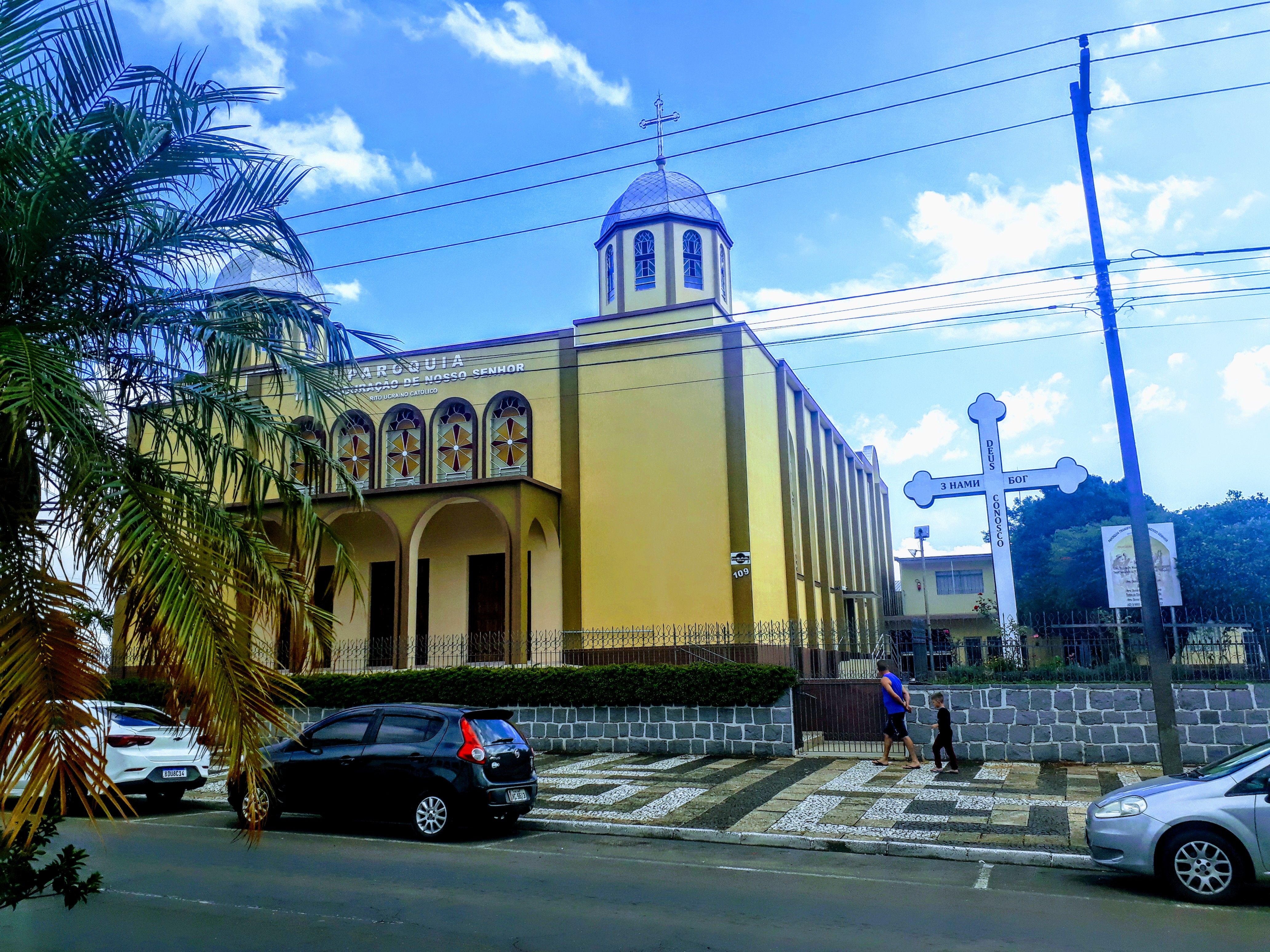 A Igreja Greco-Católica Ucraniana da Paróquia Transfiguração do Nosso Senhor, popularmente conhecida como Igreja Ucraniana (ou igreja dos ucranianos), é uma igreja fundada em 1952 pela comunidade de imigrantes ucranianos católicos na cidade de Ponta Grossa, na região dos Campos Gerais. A igreja de alvenaria foi construída entre os anos de 1972 e 1978, em estilo bizantino ucraniano católico. A tradição religiosa dos ucranianos (rito ucraino) é preservada nesta igreja. Está localizada na Avenida Dom Pedro II, 109 – Nova Rússia, Ponta Grossa, Paraná.